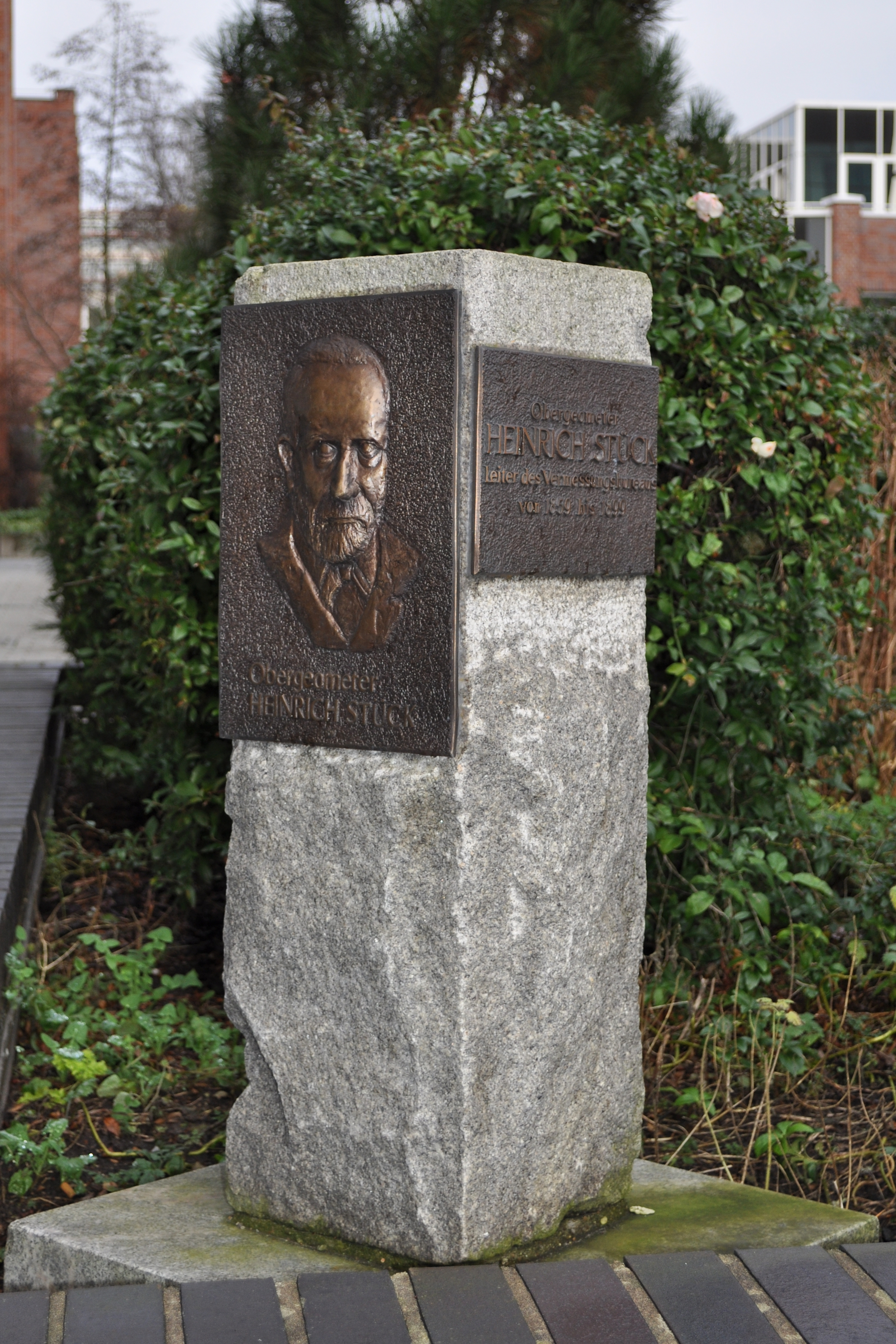 Gedenkstein für den Obergeometer Heinrich Stück vor dem Landesbetrieb Geoinformation und Vermessung in Hamburg-Hammerbrook.